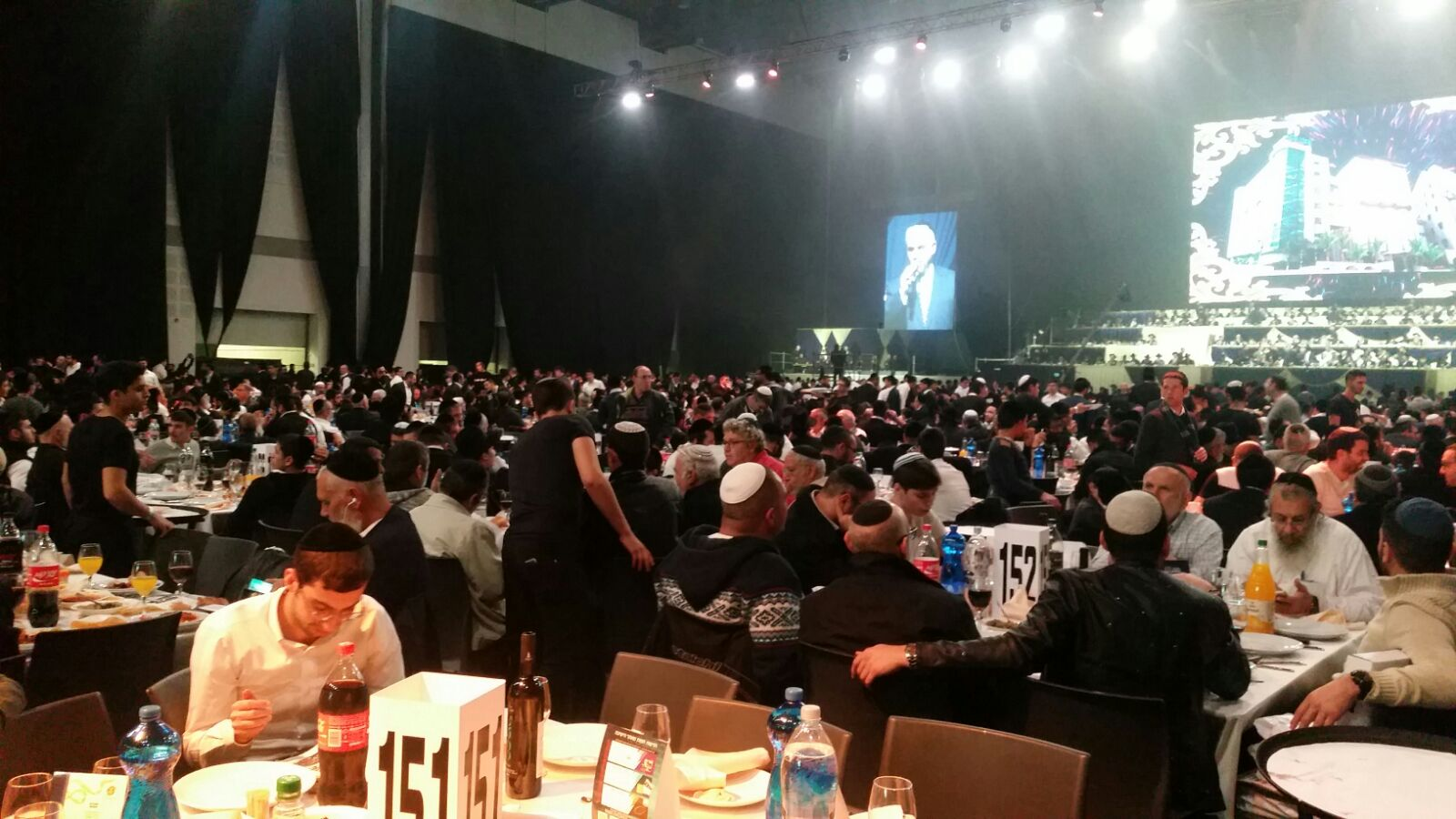 הילולת ישיבת כסא רחמים ה'תשע"ח (2018)